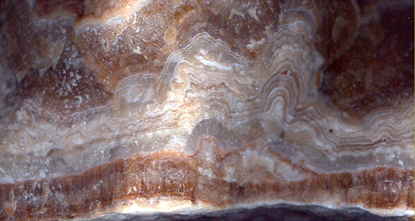 Оникс кальцитовый.Кальцитовый оникс из карстовой пещеры "Виноградная", 14см., Хайдаркан, Киргизия. Фото / коллекция Виктор Слётов.